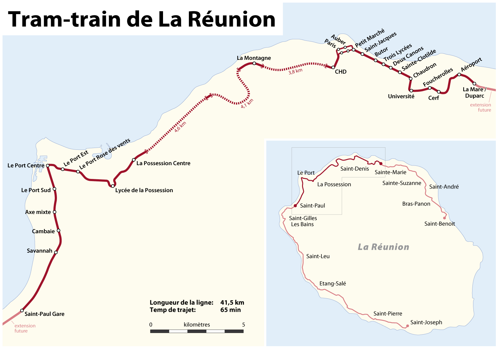 Streckenkarte der geplanten Stadtbahn auf der Insel Réunion